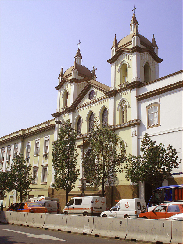 Capela Nosso Senhor dos Passos, inclusa no corpo da Santa Casa de Misericórdia de Porto Alegre, Brasil.